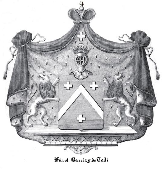 Герб князя Барклай де Толли